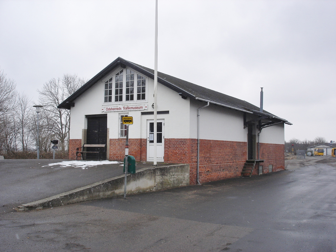 Odsherreds Trafikmuseum i Hørve Stations varehus fra vejsiden